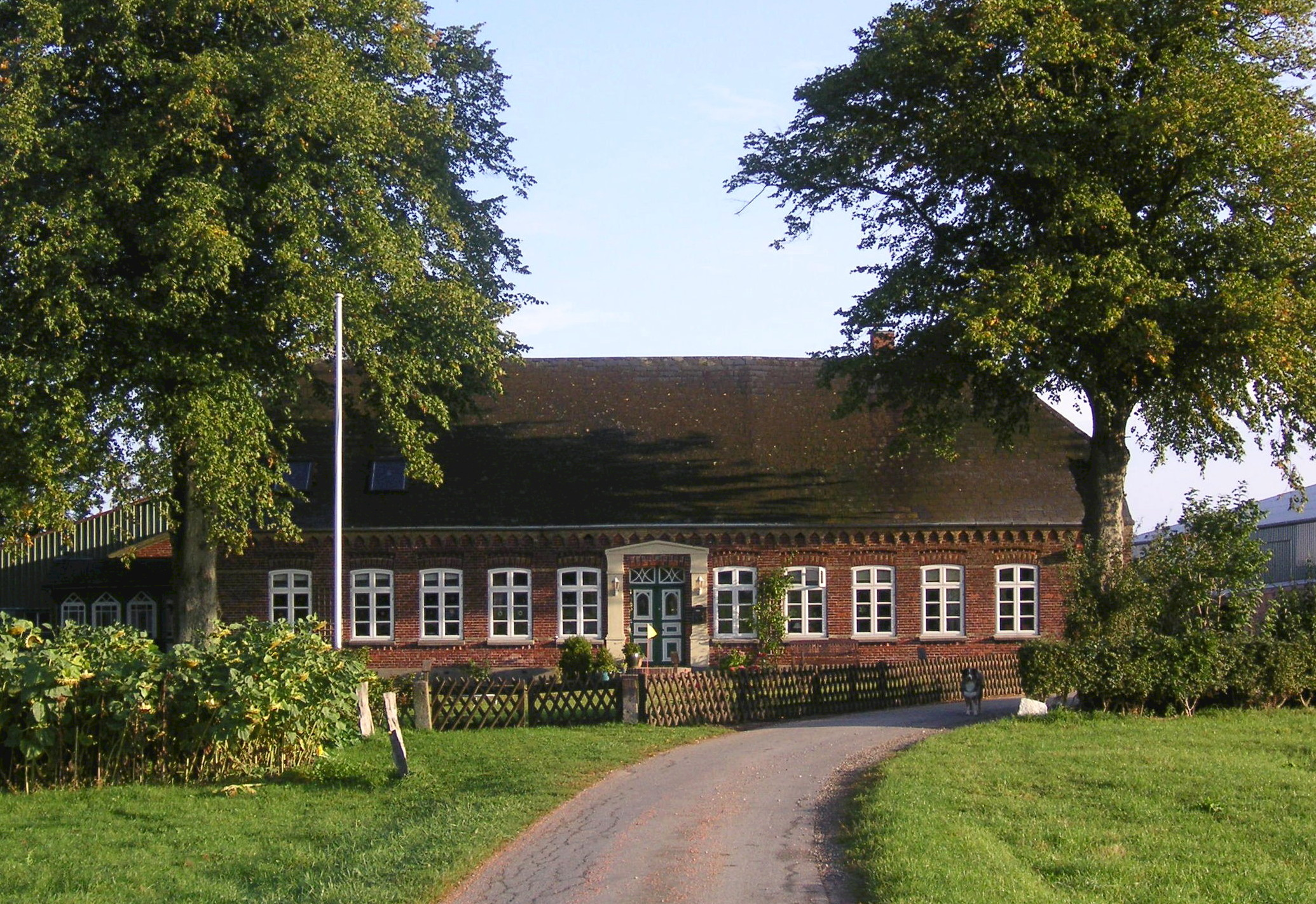 Bauernhof Ellgaard in Dollerup